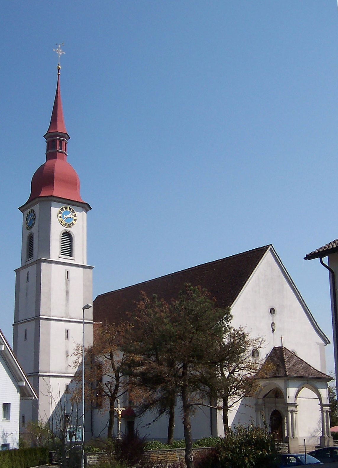 Pfarrkirche St.Nikolaus in Auw, Kanton Aaargau, Schweiz (Nord-Westansicht)